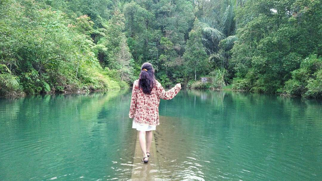 Danau banaran, sukorejo, kendal, jawa tengah. Merupakan tuk atau tempat untuk menampung air hujan. More photo check on my instagram @bubble.pinky